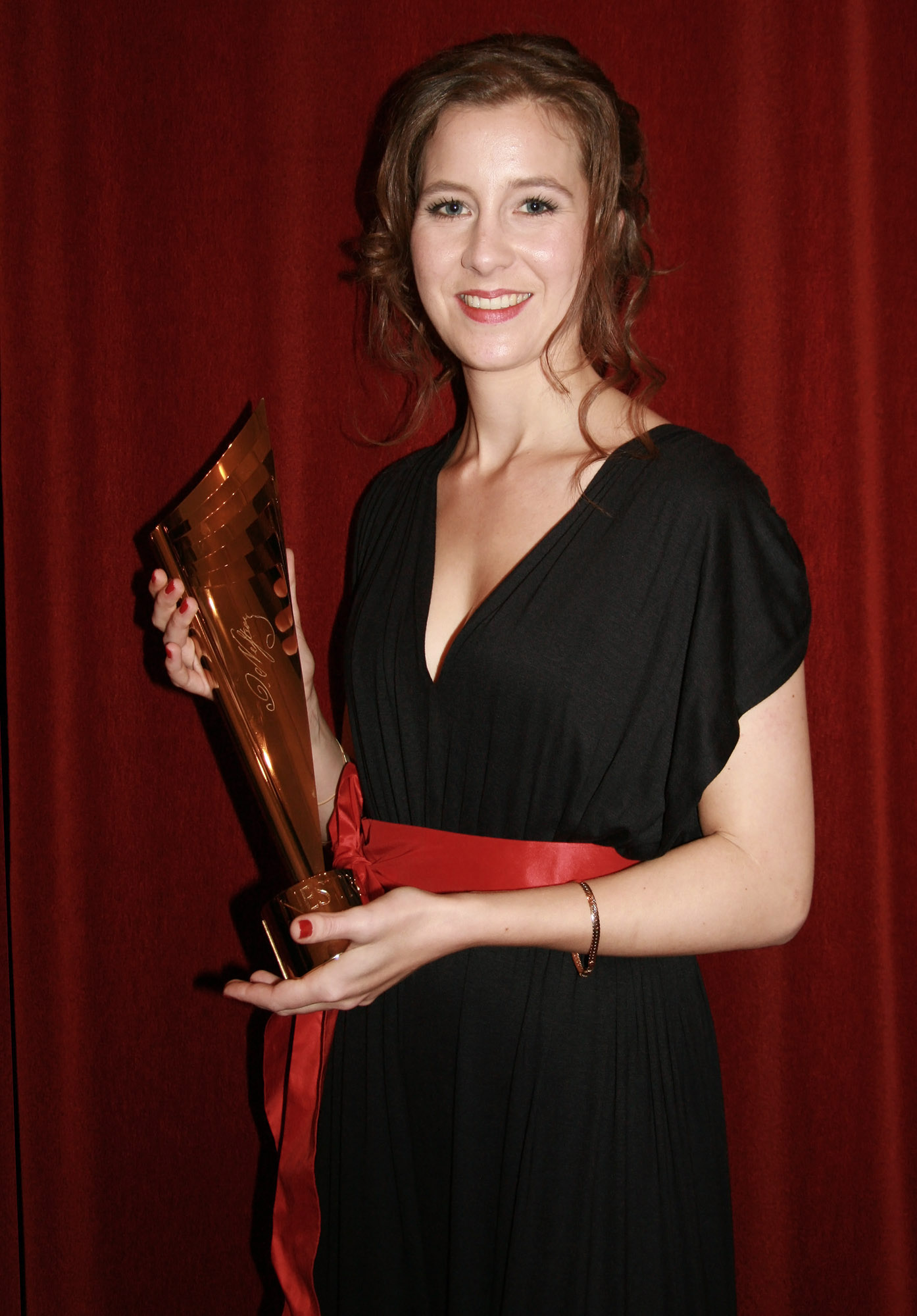 Franziska Hackl, ausgezeichnet als beste Nachwuchsschauspielerin, bei der Verleihung des Nestroy-Theaterpreises 2011 im Raimund Theater in Wien.